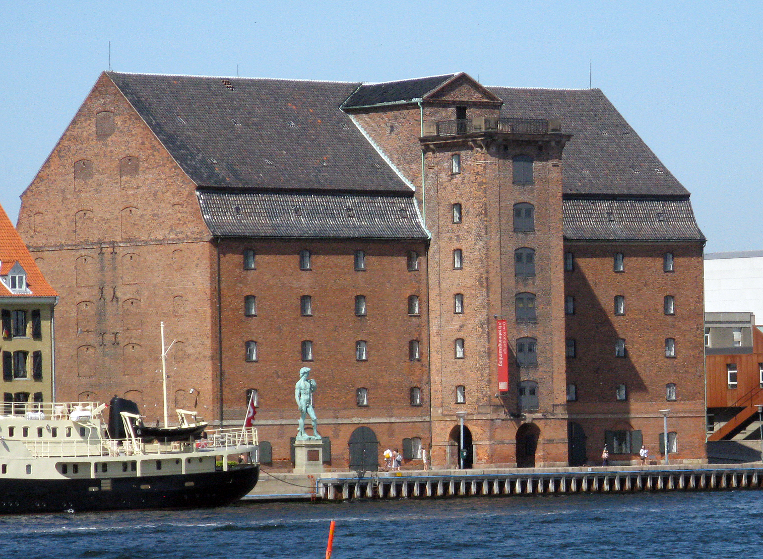 Vestindisk Pakhus København